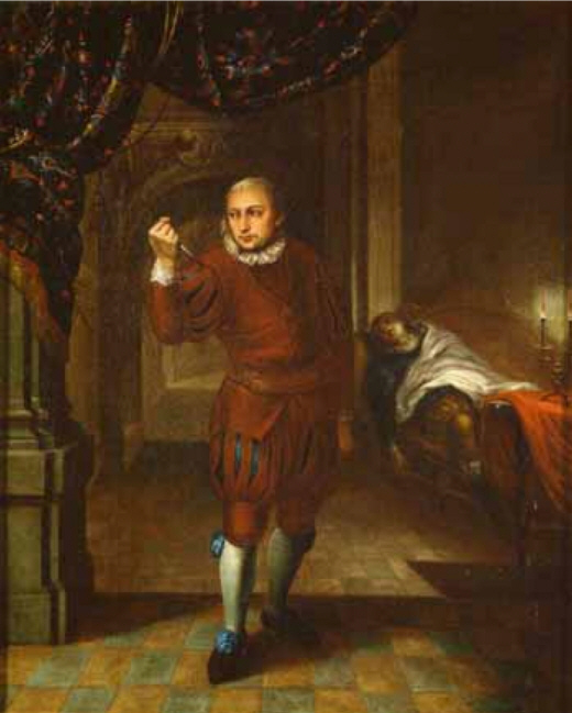 Rollenportrait Ferdinand Fleck (1757–1801) als "Macbeth" im gleichnamigen Stück (Bürger, nach Shakespeare), Berlin 1787, Öl auf Leinwand, 55,5 x 45,5 cm Theaterwissenschaftliche Sammlung der Universität zu Köln, Schloss Wahn, Inv.Nr. 30097